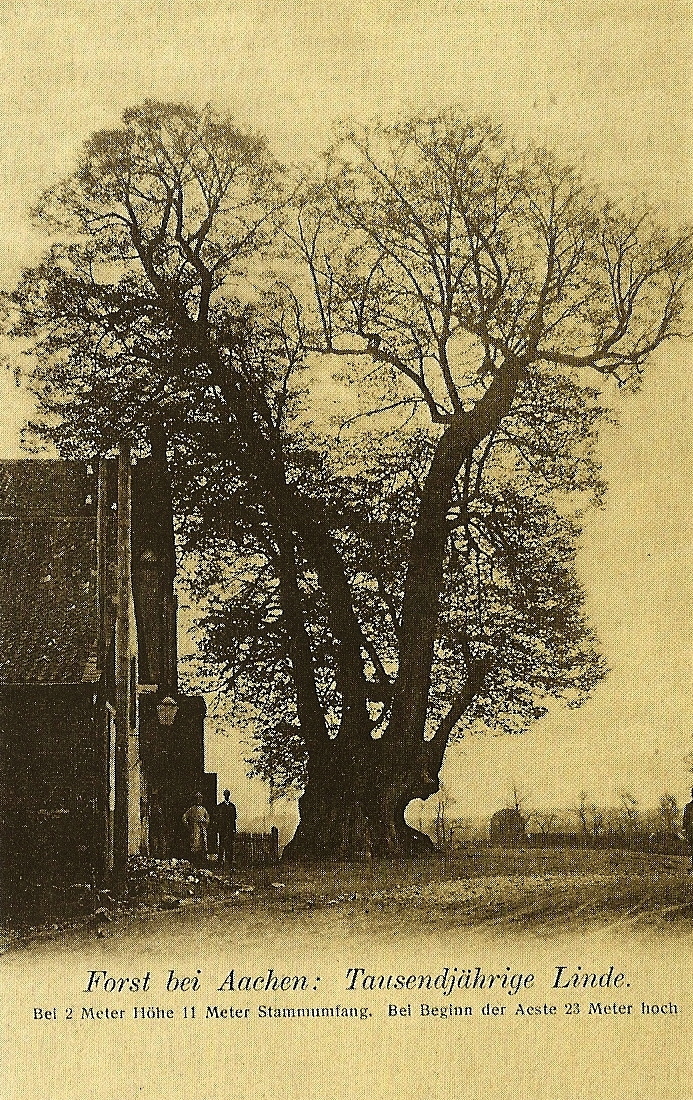 Die Forster Linde auf einer alten Postkarte um 1910